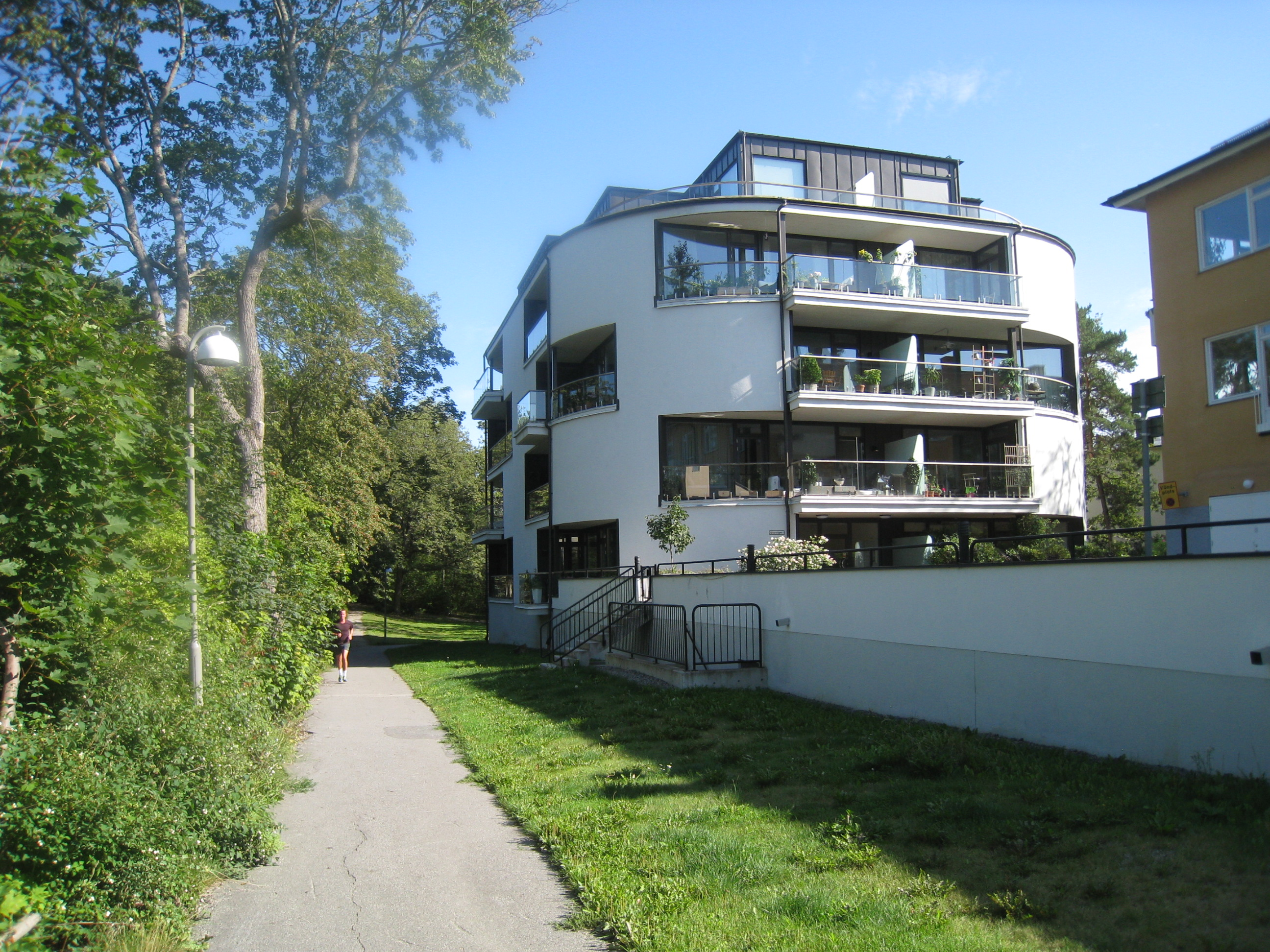 Bostadshus, ett flerfamiljshus, i kvarteret Guldfågeln, Jättestigen 1, Smedslätten, Bromma.